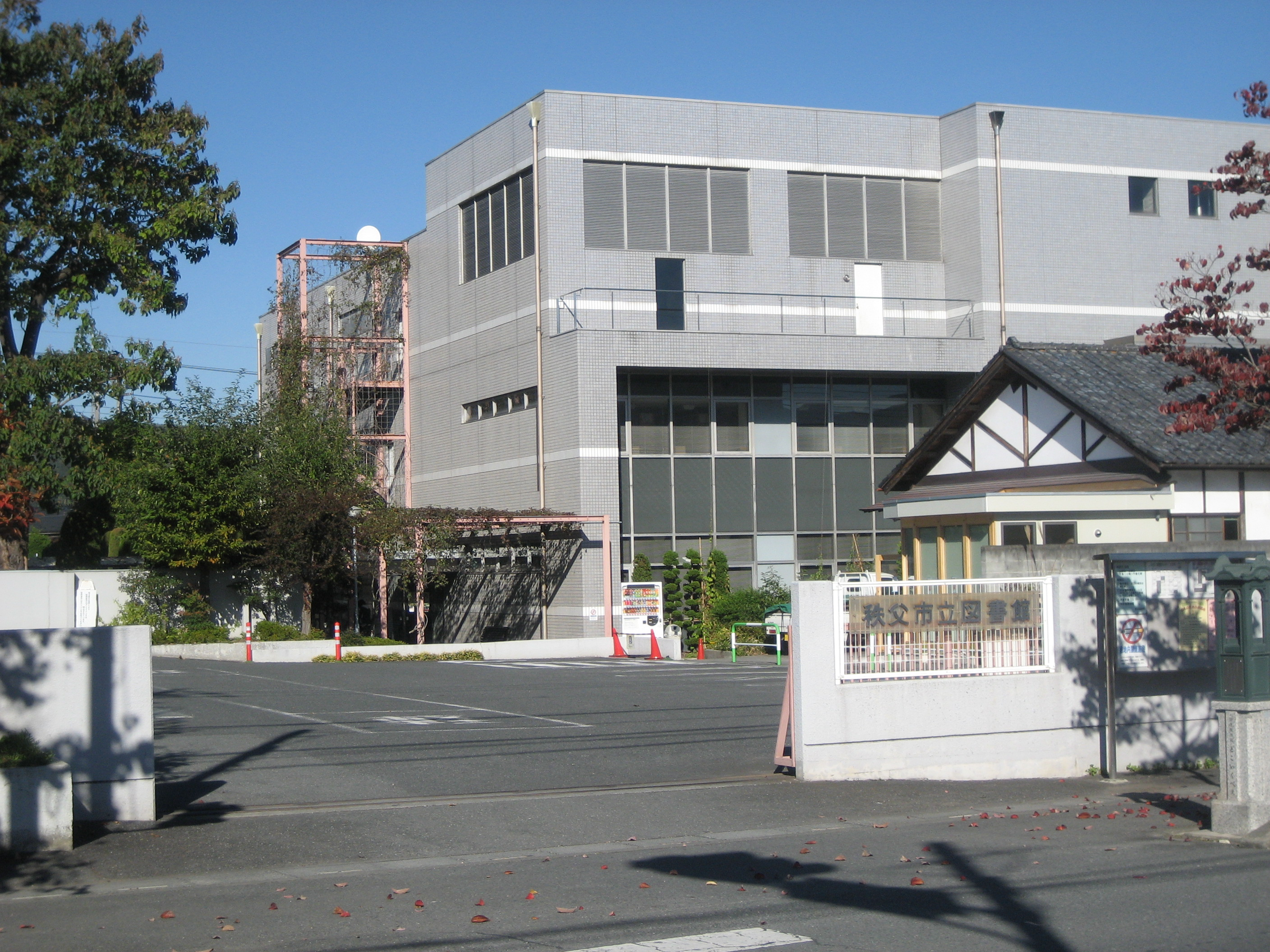 秩父市立秩父図書館（入口付近から撮影）